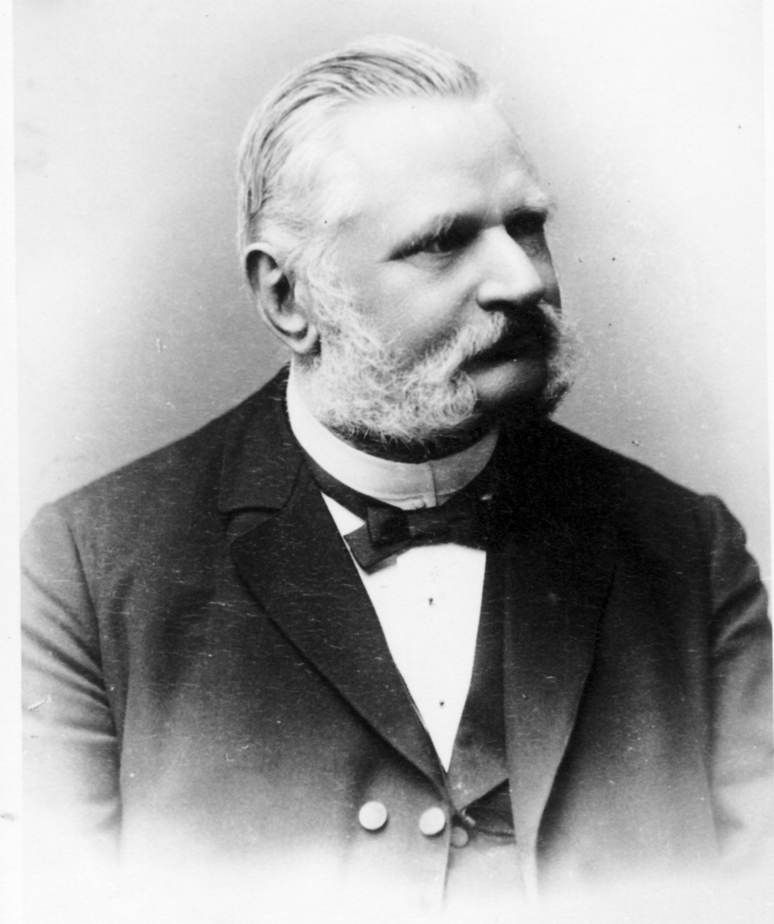 Johannes Doebel mein Urgroßvater